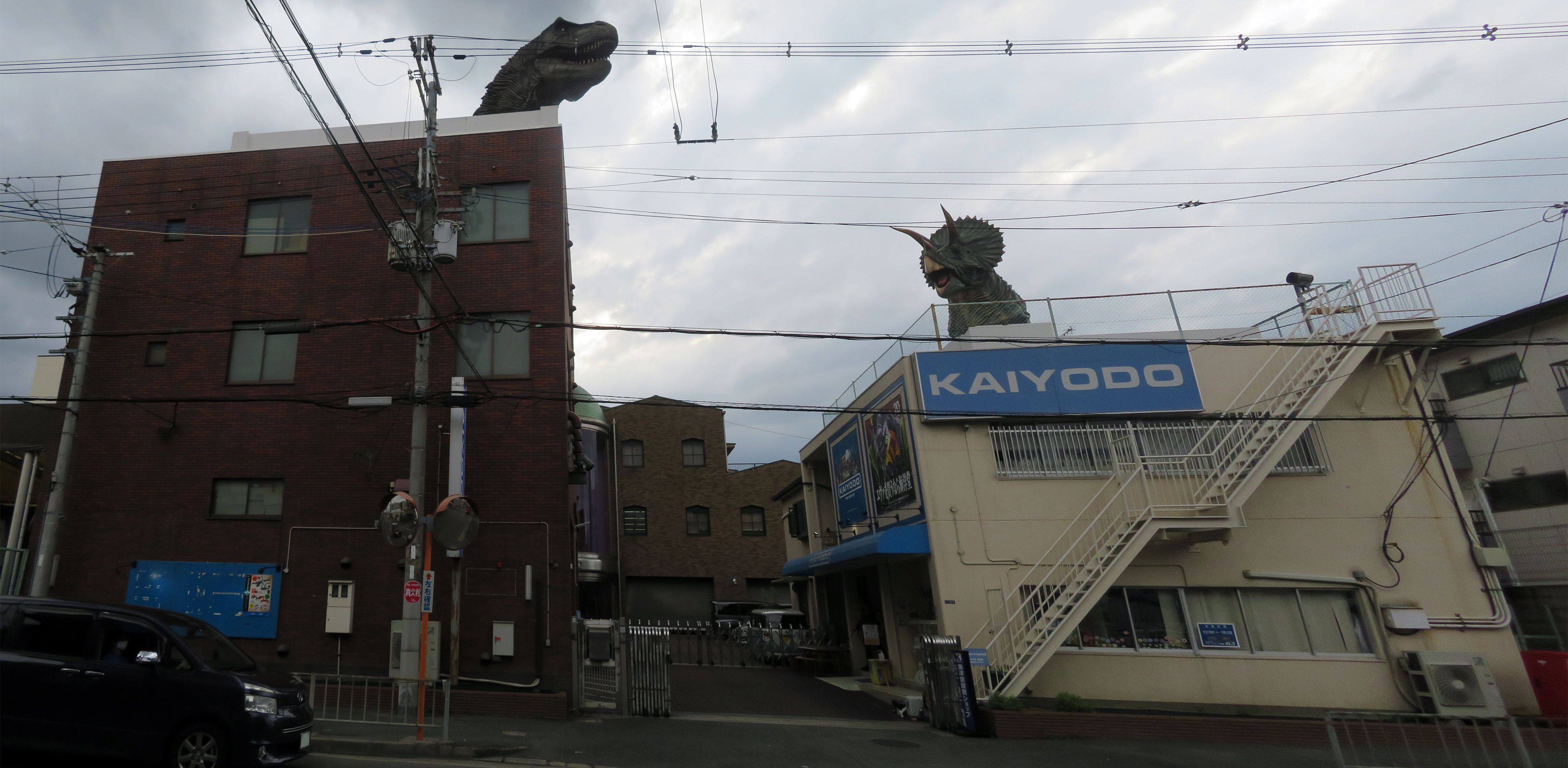 株式会社海洋堂本社を撮影。